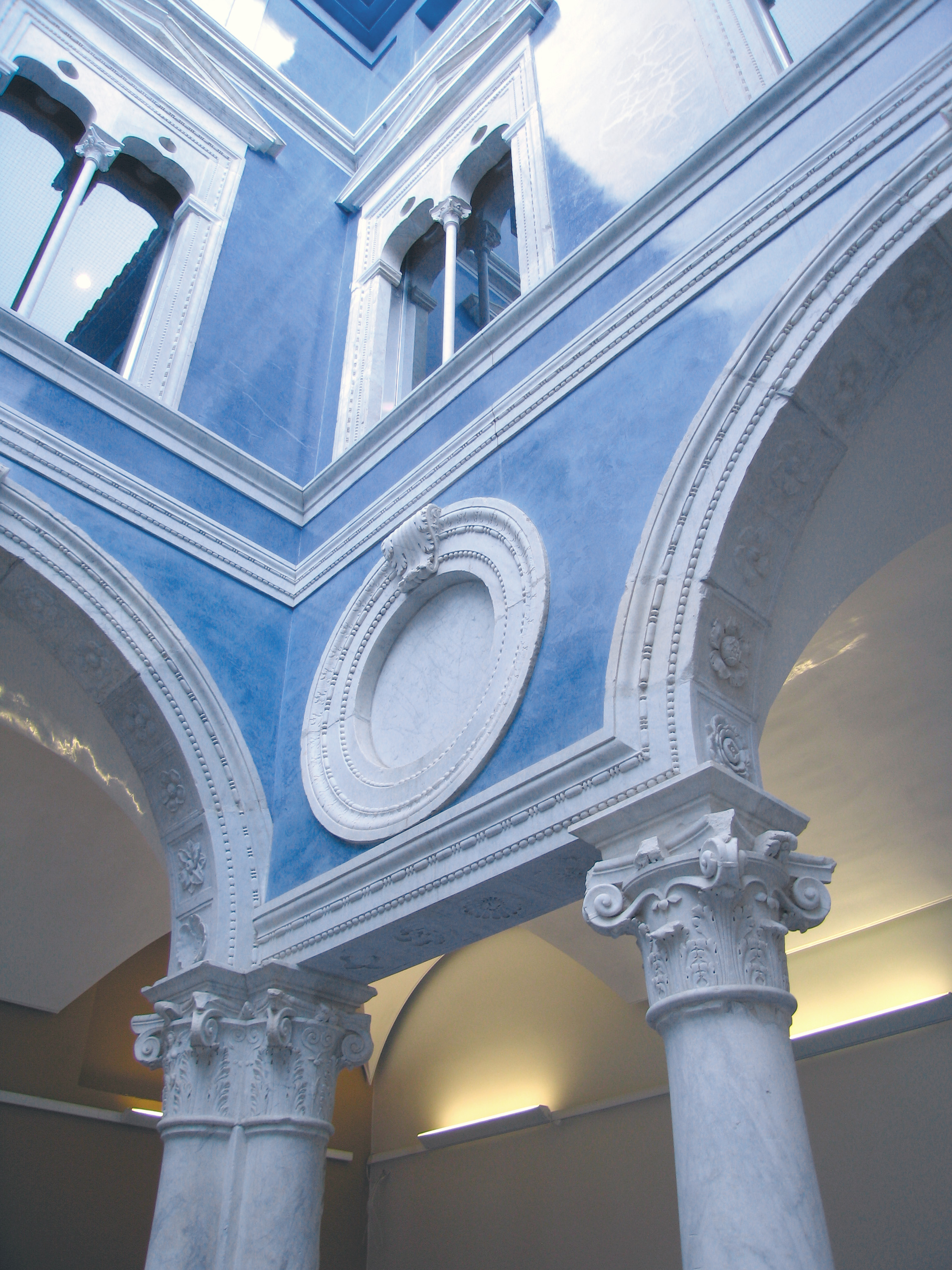 Pati de l'Ambaixador Vich, sant pius V (València)